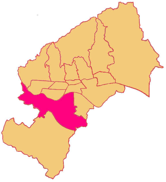 Map of Novi Zagreb Zapad District in Zagreb (Gradska četvrt Novi Zagreb Zapad)